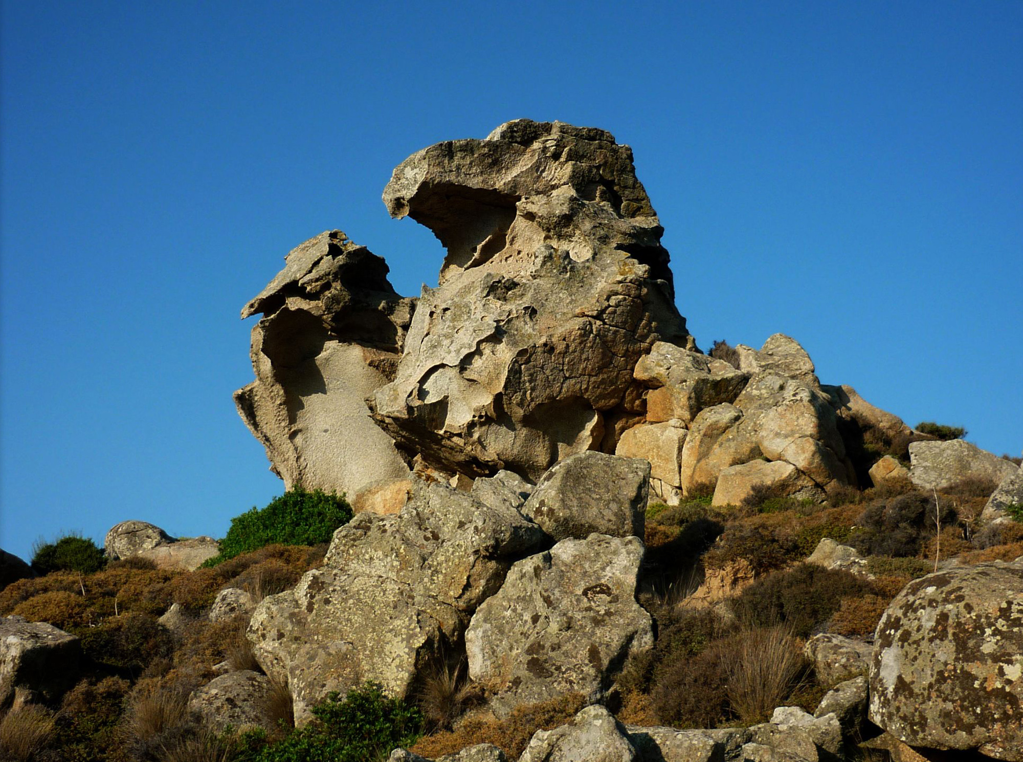 Bράχια στη περιοχή της Bωλάξ. Nήσος Tήνος, Eλλάδα.